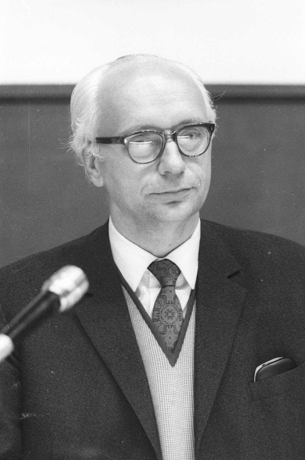 Direktor des Seminars für Allgemeine und Indogermanische Sprachwissenschaft der Christian-Albrechts-Universität (CAU) und Referent der 20. Kieler Universitätstage 1971.